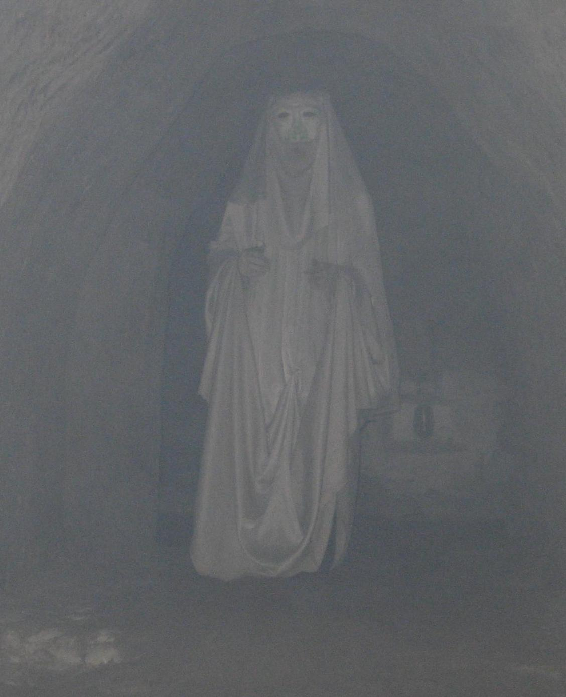 Chełm - podziemia kredowe, duch Bieluch.